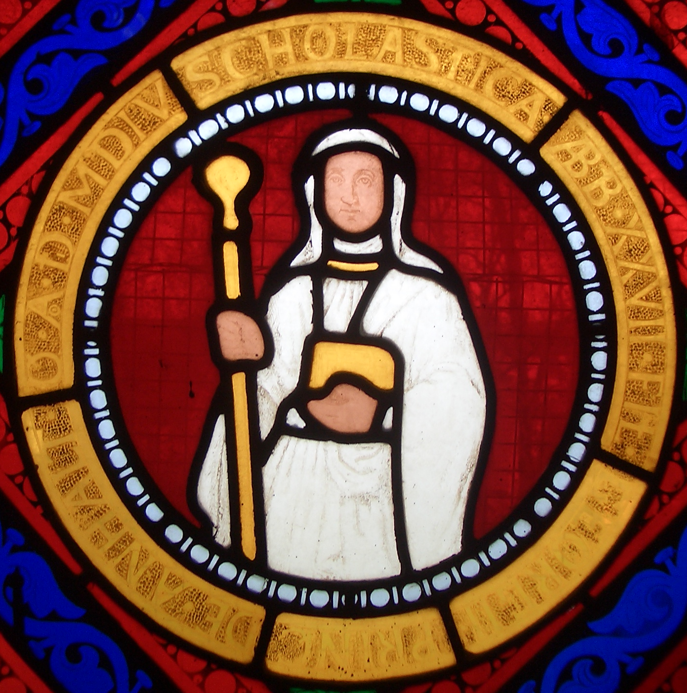 Scholastika von Anhalt